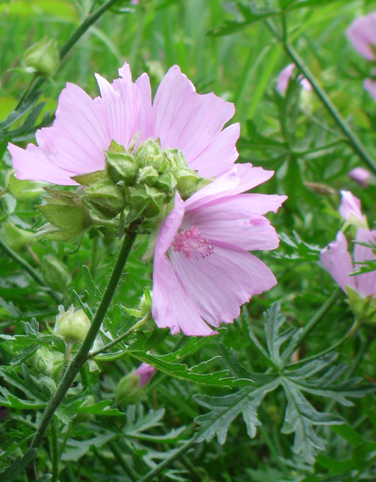 It looks like Malva moschata